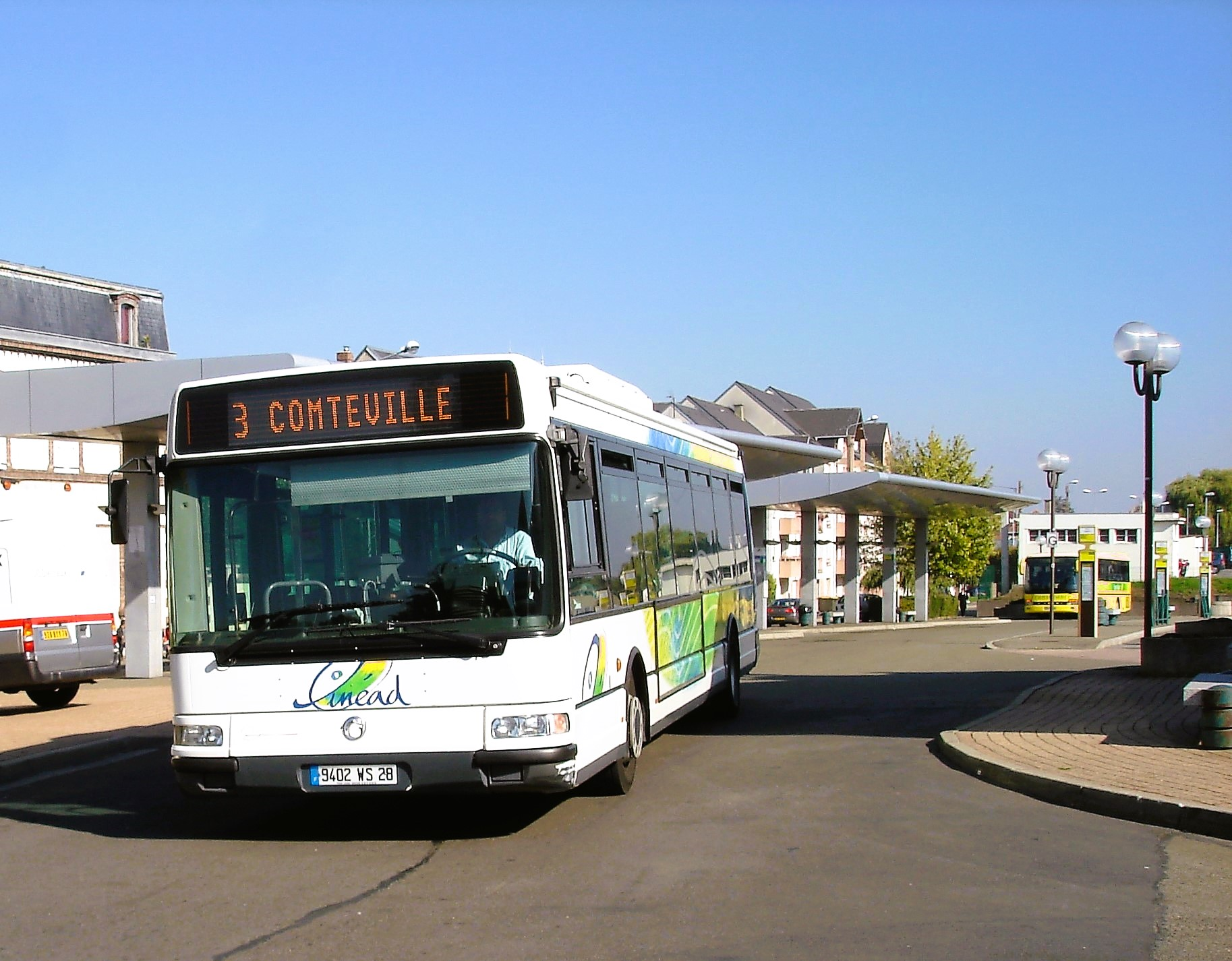 Dreux (28) : Un bus Linéad de la ligne 3, à la gare routière.